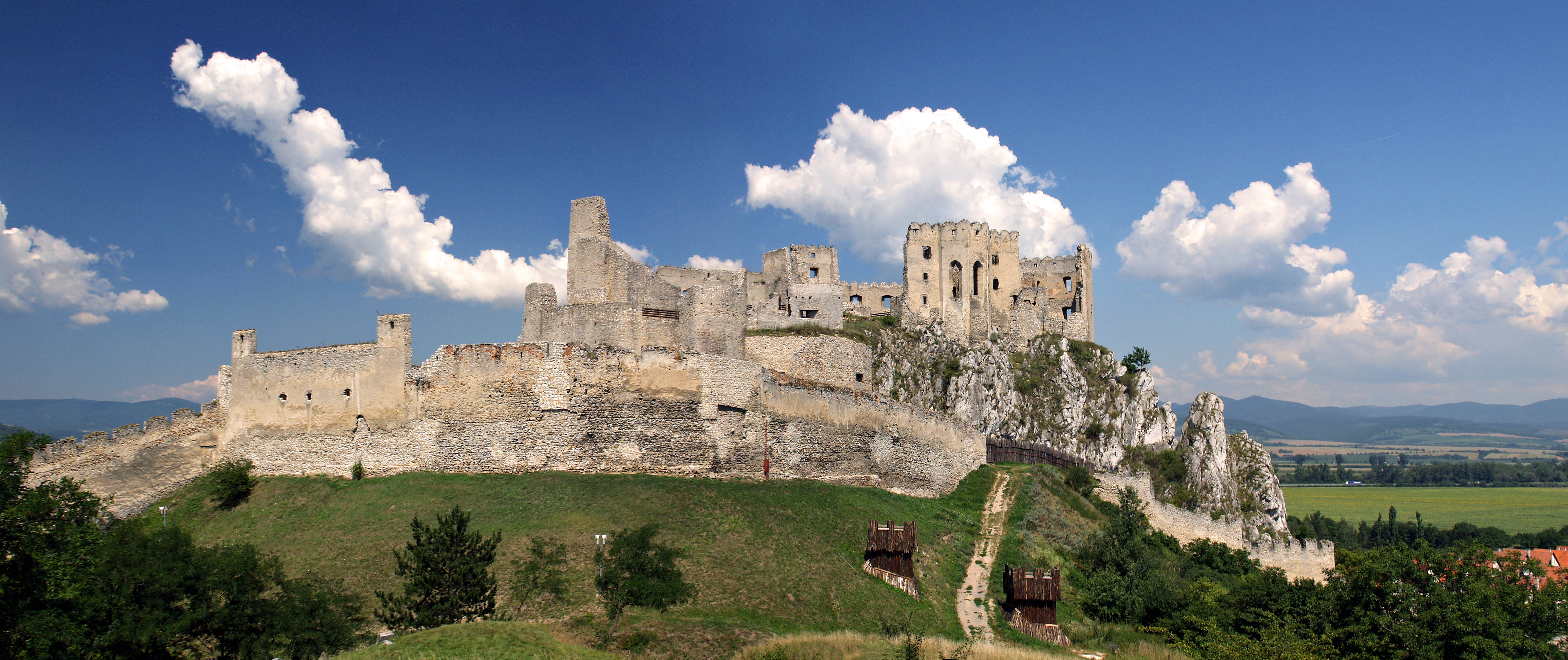 Beckov - Les ruines du château